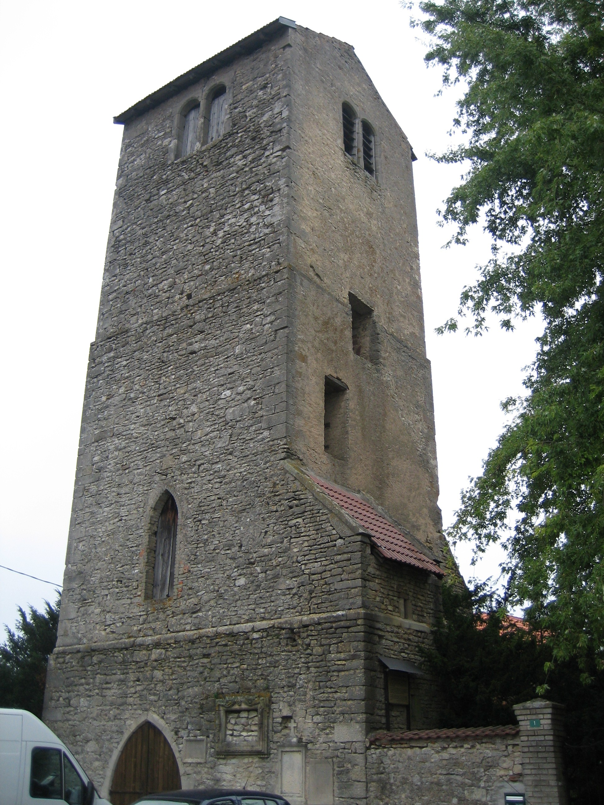 Vue du clocher de l'ancienne église Saint-Pierre de Gerbéviller par Raphaël Tassin (raphdvoj) le 16 septembre 2006